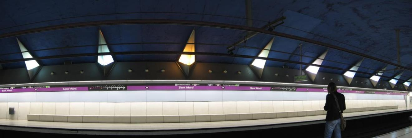 Platform of Sant Martí station, Barcelona Metro/Andana de l'estació Sant Martí, Barcelona